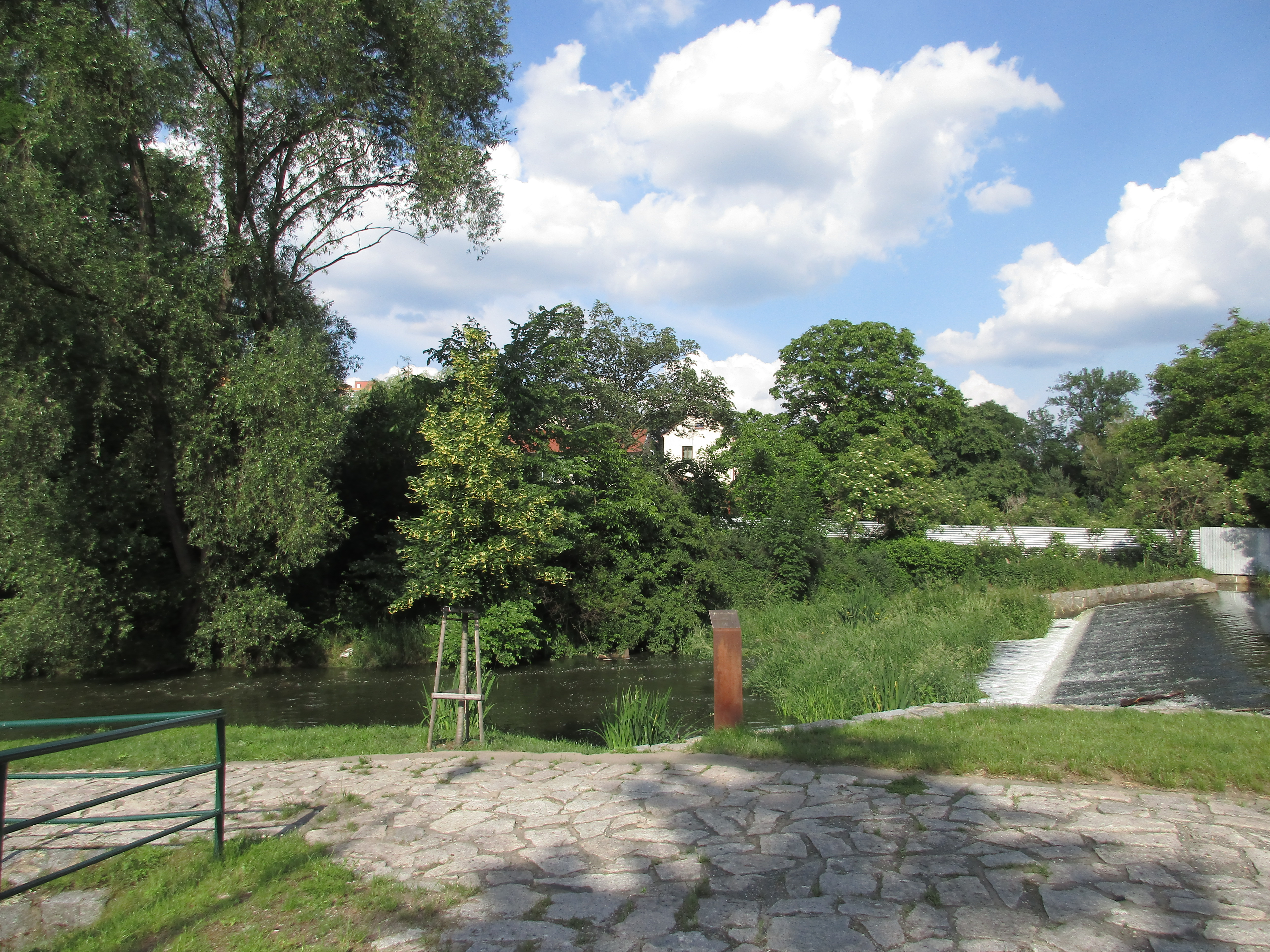 Lípa svobody. Praha 10 - Záběhlice, ulice U Záběhlického zámku. Lípa vysazená 26. května 2018 jako náhrada za zaniklou lípu.